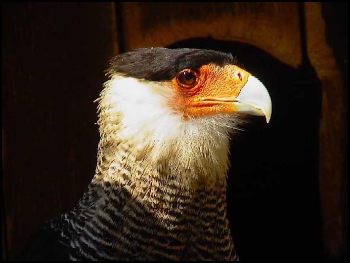 Schopfkarakara (Caracara plancus)